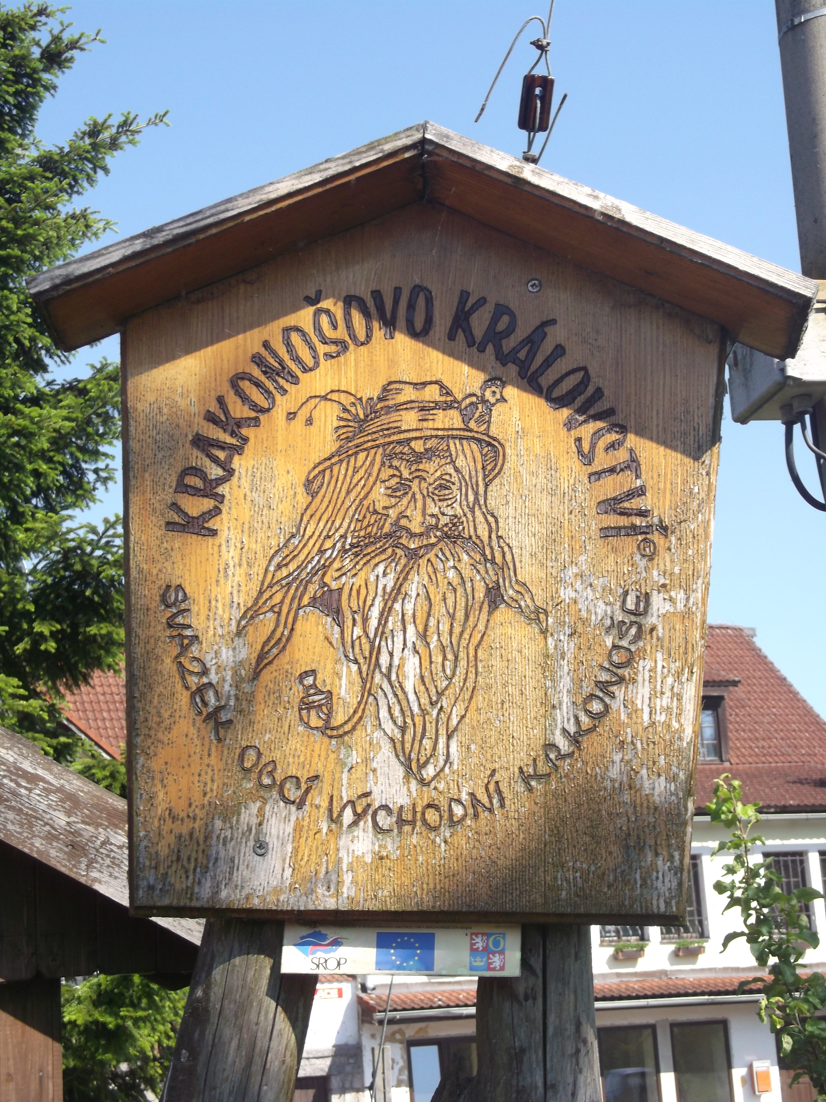 Hertvíkovice - cedule "Krakonošovo království"